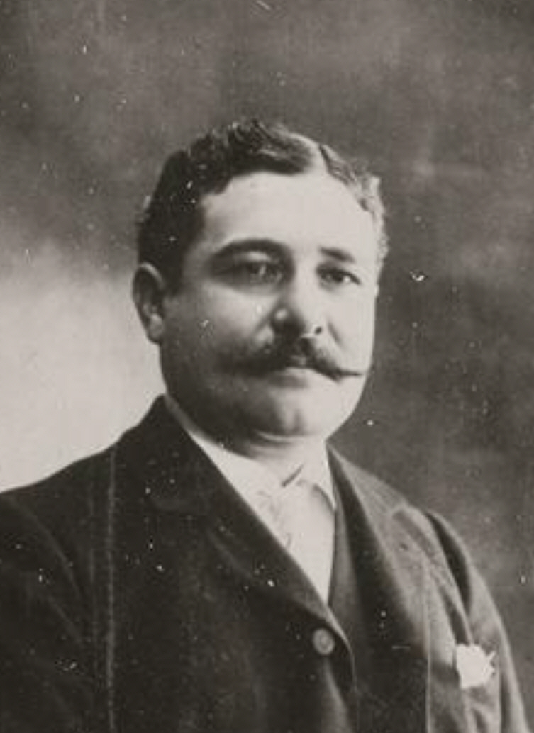 Léon Daudet (* 16 November 1867; † 30 June 1942), écrivain et polémiste français (vers 1900).